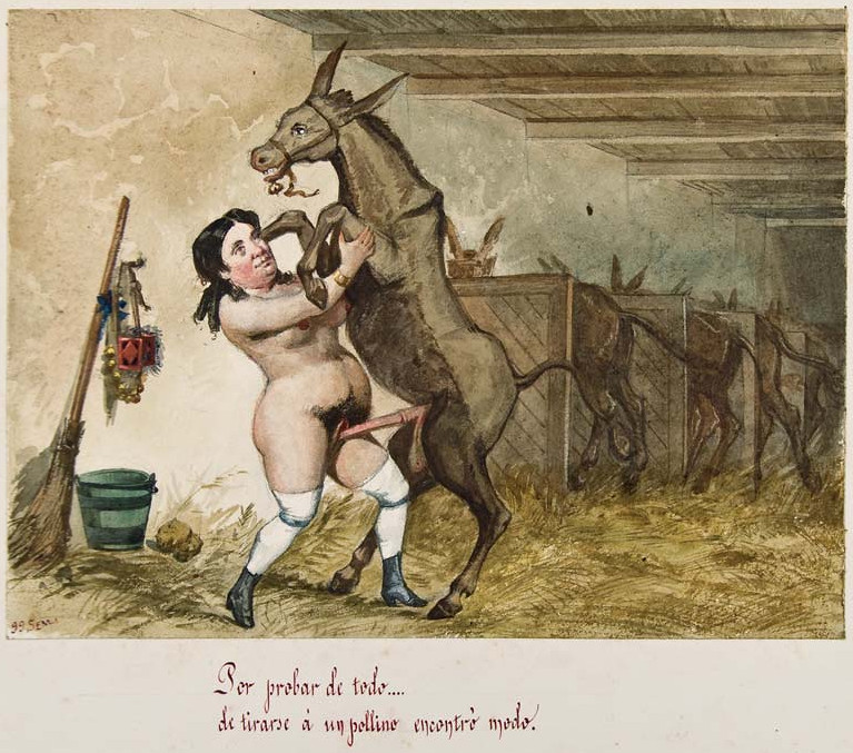 Isabel II fornicando con un asno. Leyenda de la acuarela: "Por probar de todo... de tirarse a un pollino encontró modo".Translation: "Isabel II fornicating with a donkey. Legend of watercolor: "By trying everything ... from being pulled so found a colt."